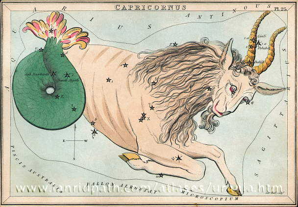 Зображення сузір'я Козерога із «Дзеркала Уранії», набору карток сузірь опублікованого у Лондоні, бл. 1825